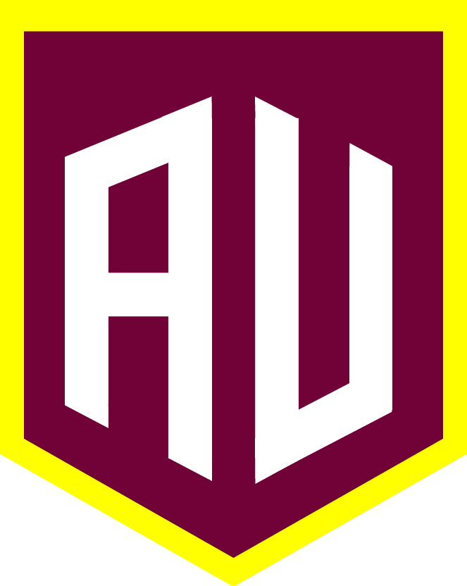 Insignia representativa del colegio Alfonso Ugarte.